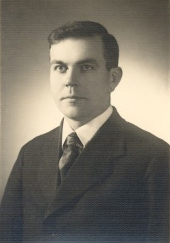 Jüri Haldre, eesti röntgenoloog ja radioloog